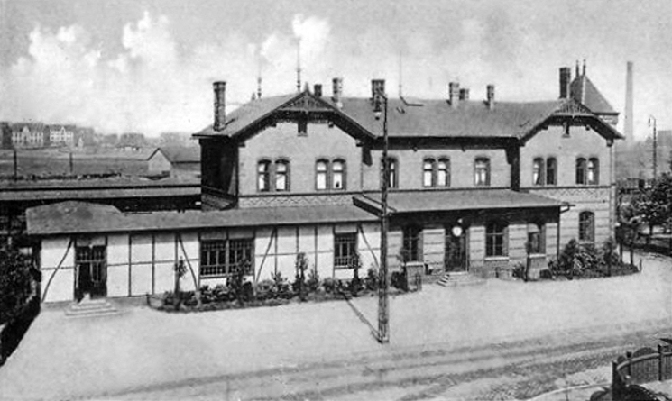 Bahnhof Kray Nord, seit 1950 Essen-Kray Nord, Empfangsgebäude